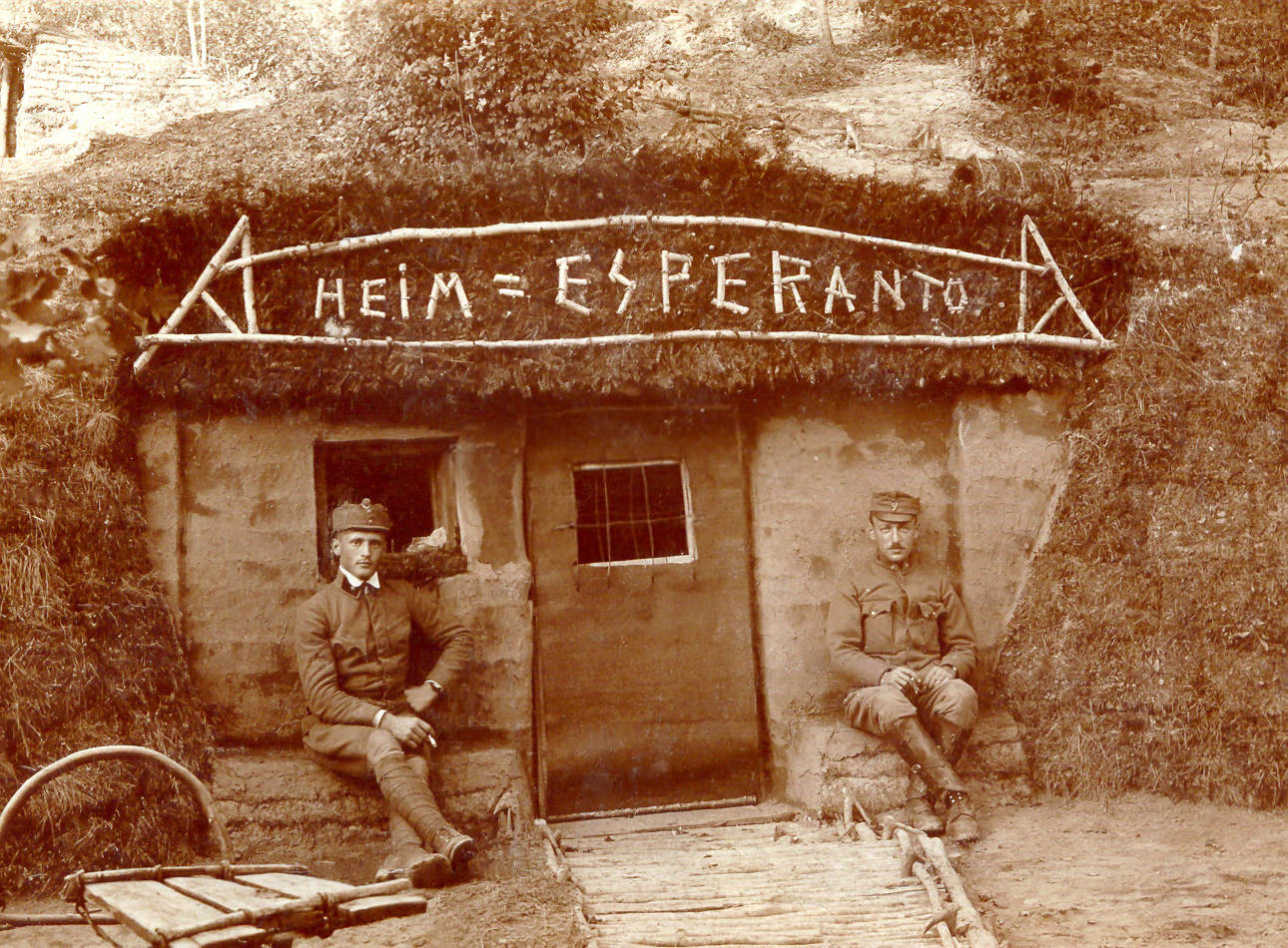 Orienta fronto en Galicio dum la unua mondmilito, 1916. Aŭstraj soldatoj kiel esperantistoj. Dekstre sidas Julius Glück.